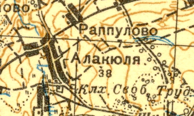 Топографическая карта Ленинградской области, квадрат О-35-12-Г (Ропша), деревня Рапполово